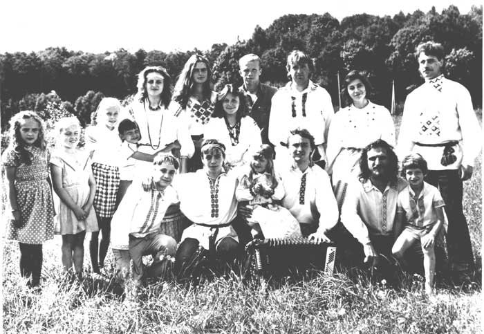 Беларуская (тарашкевіца): Выхавацелі, завадатары i выхаванцы летніку Грунвальд, 1990. Унiзе зьлева направа – Мiкола Гракаў, Алег Грушэцкi, праз дзяўчыну – Зьмiцер Марчук, Сяржук Шаўцоў. Уверсе з крыжом на кашуле - Ксенiя Дзягiлява, побач Уладзiмер Панада.